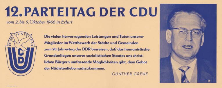 12. Parteitag der CDU ... Die vielen hervorragenden Leistungen und Taten unserer Mitglieder im Wettbewerb der Städte und Gemeinden zum 20. Jahrestag der DDR beweisen, daß das humanistische Grundanliegen des sozialistischen Staates uns christlichen Bürgern umfassende Möglichkeiten gibt, dem Gebot der Nächstenliebe nachzukommen. Günther Grewe Abbildung: Parteilogo - Porträtfoto Günther Grewe Plakatart: Kandidaten-/Personenplakat mit Porträt Drucker_Druckart_Druckort: III-9-19 Ag 224-100-68 7265 Objekt-Signatur: 10-024 : 3072 Bestand: Plakate aus der SBZ/DDR (10-024) GliederungBestand10-18: Ost-CDU / CDUD / Exil-CDU Lizenz: KAS/ACDP 10-024 : 3072 CC-BY-SA 3.0 DE